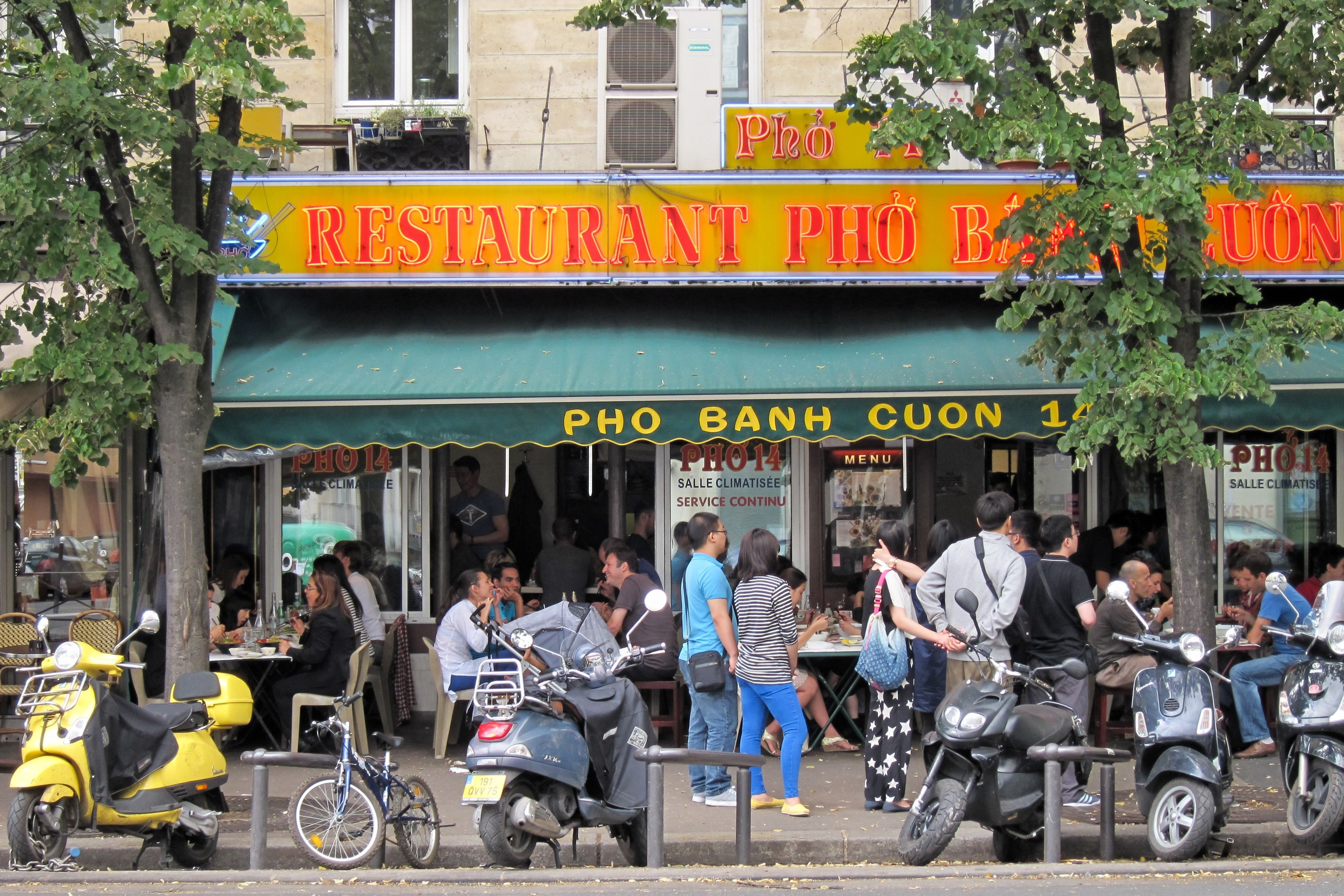 Restaurant vietnamien Pho 14, 129 avenue De Choisy, Paris.